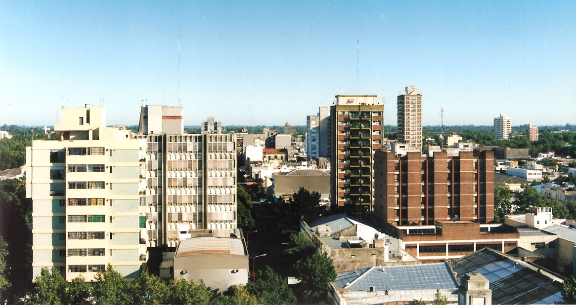 Vista de la zona céntrica de la ciudad de Junín.